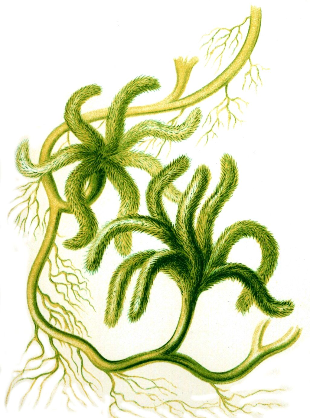 Caulerpa paspaloïdes (Harvey) = Caulerpa paspaloides (Bory de Saint-Vincent) Greville, habitus